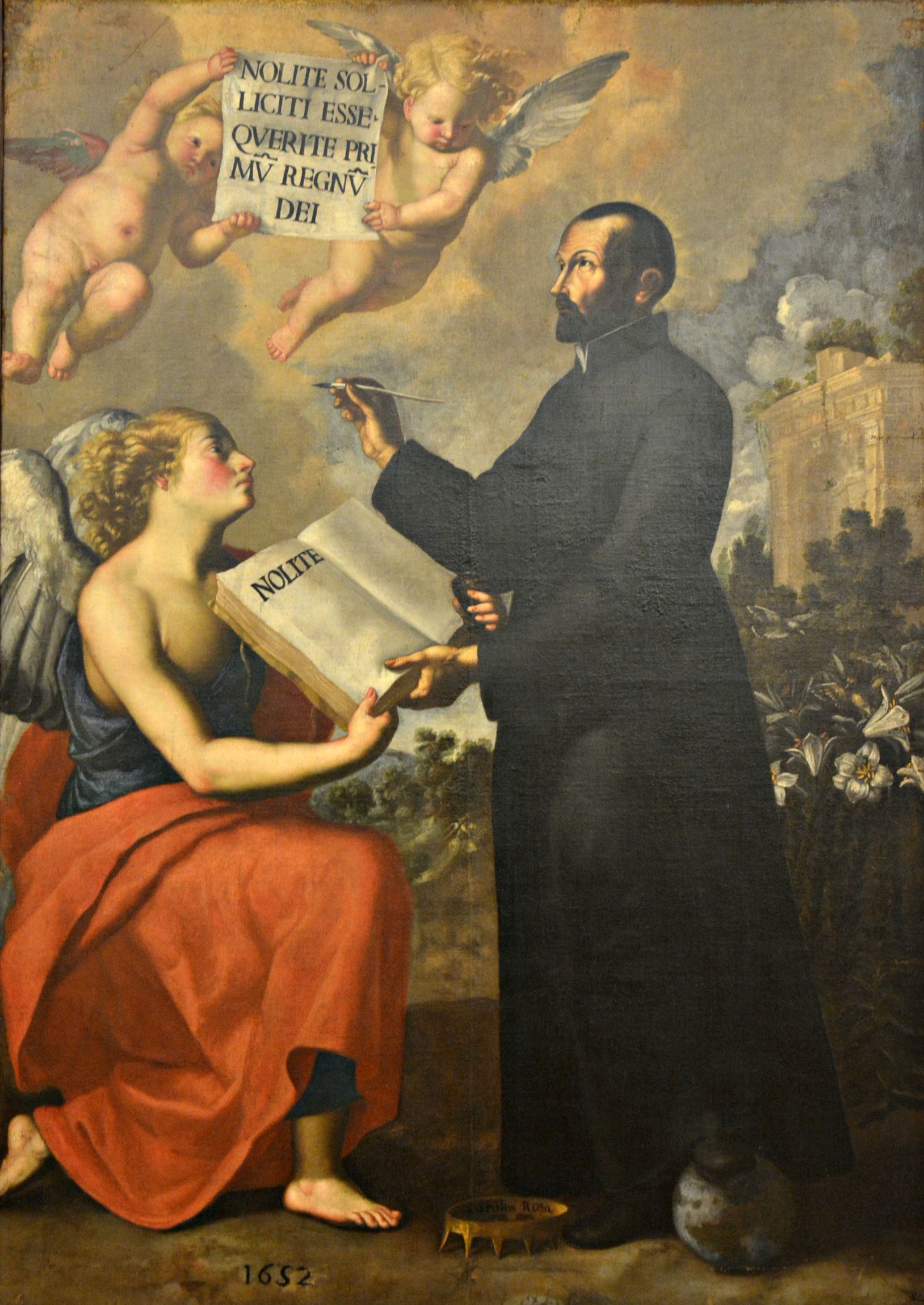 San Gaetano